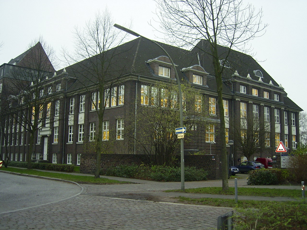 Das ehemalige Kinderkrankenhaus in der Marckmannstraße 131 in Rothenburgsort wurde 1914 bis 1917 nach Plänen der Architekten Martens und Henry Grell erbaut.